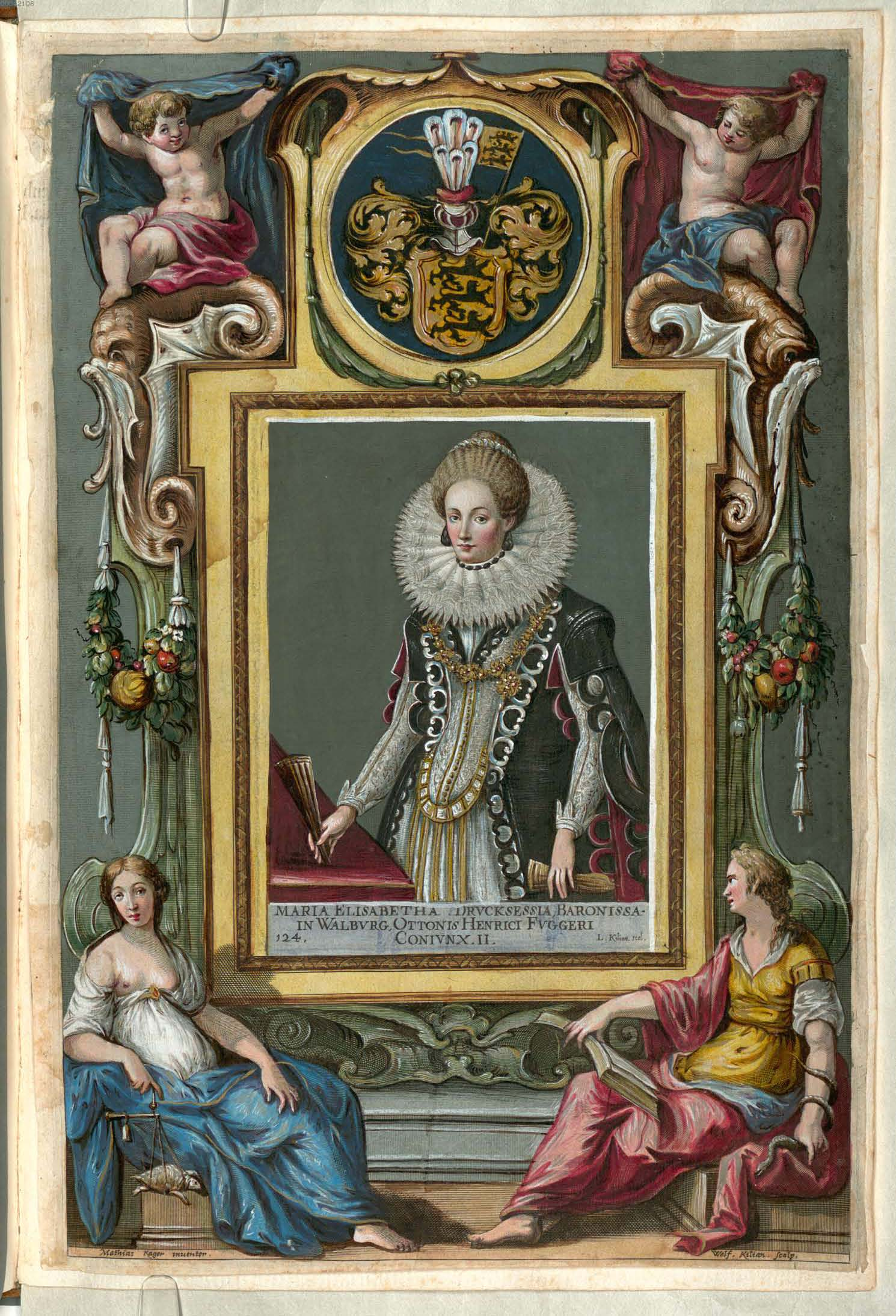 Fuggerorum et Fuggerarum imagines wurde 1588 von Philipp Eduard Fugger beim Kupferstecher Dominicus Custos in Auftrag gegeben. Das Werk enthält mit Aquarell- und Gouache-Farbe kolorierte Stiche der Mitglieder der Fugger von der Lilie. Der Druck von 1618 stellt das einzige kolorierte Exemplar dar. Maria Elisabeth, Freiin von Waldburg (?-1660), zweite Ehefrau des Otto Heinrich (Ottheinrich) Graf Fugger (1592-1644)